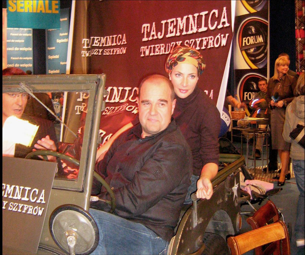 Stoisko serialu "Tajemnica twierdzy szyfrów"